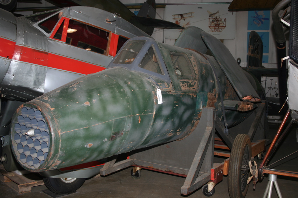 An unrestored Bachem Ba 349